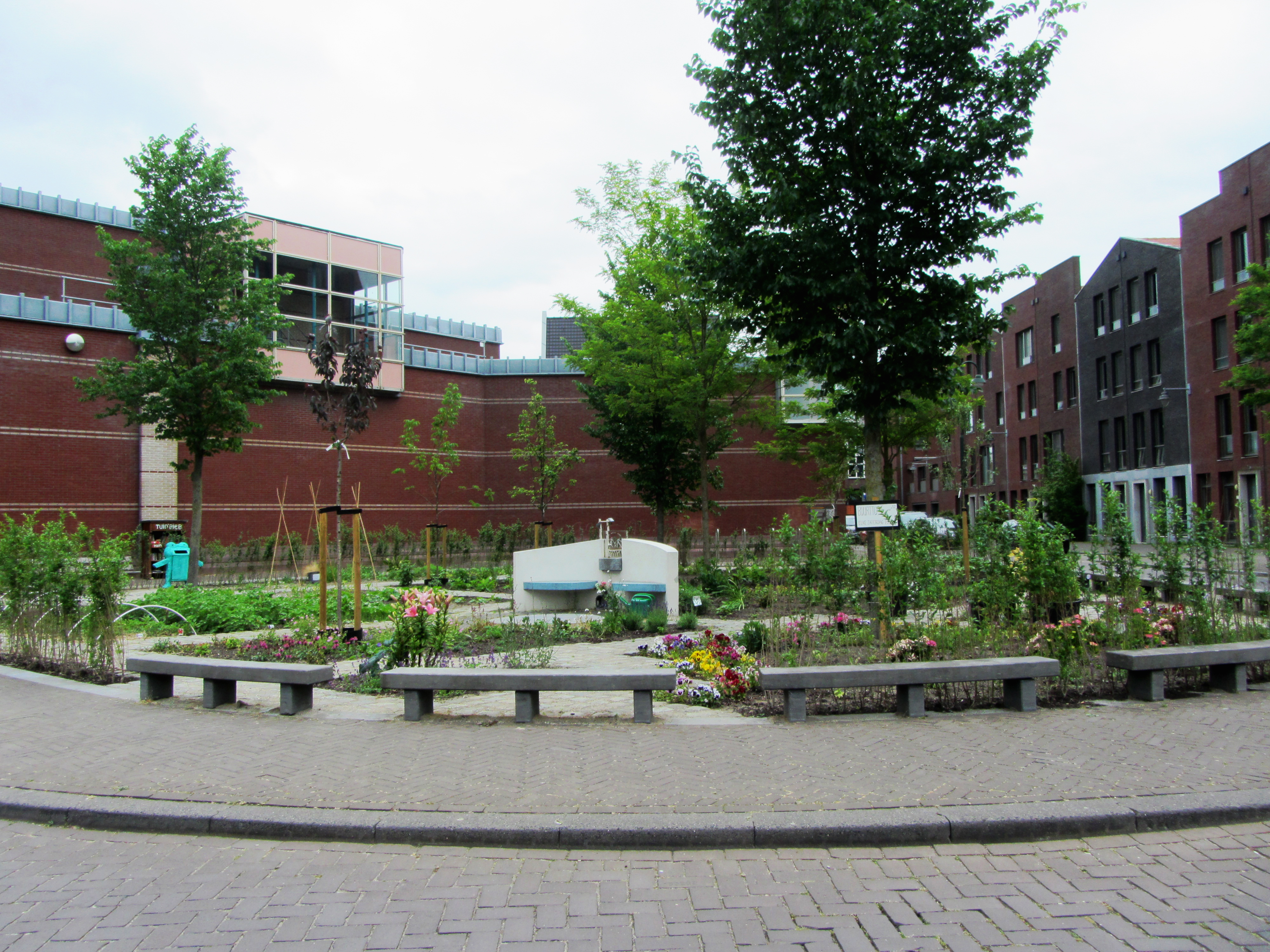 Monument tegen zinloos geweld (Mariëlla de Geus) en Stadstuinderij De Raam in Gouda